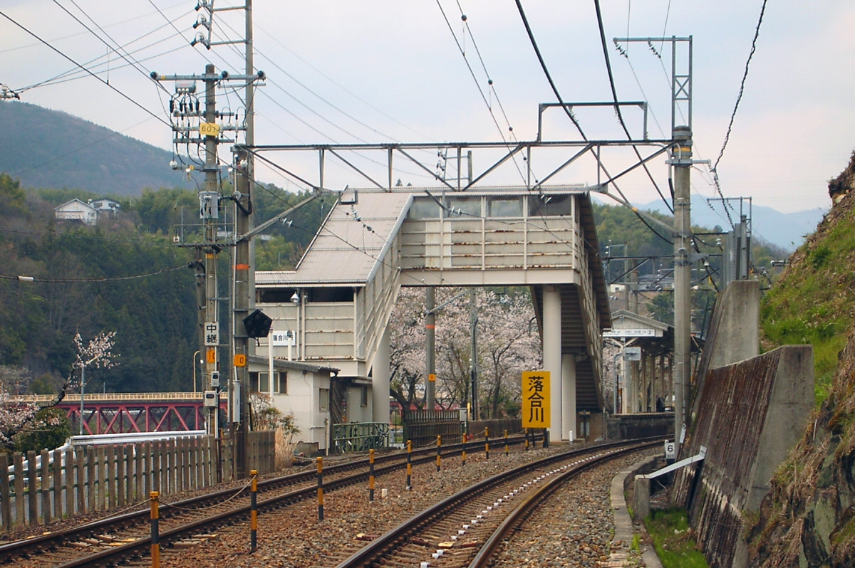 JR落合川駅